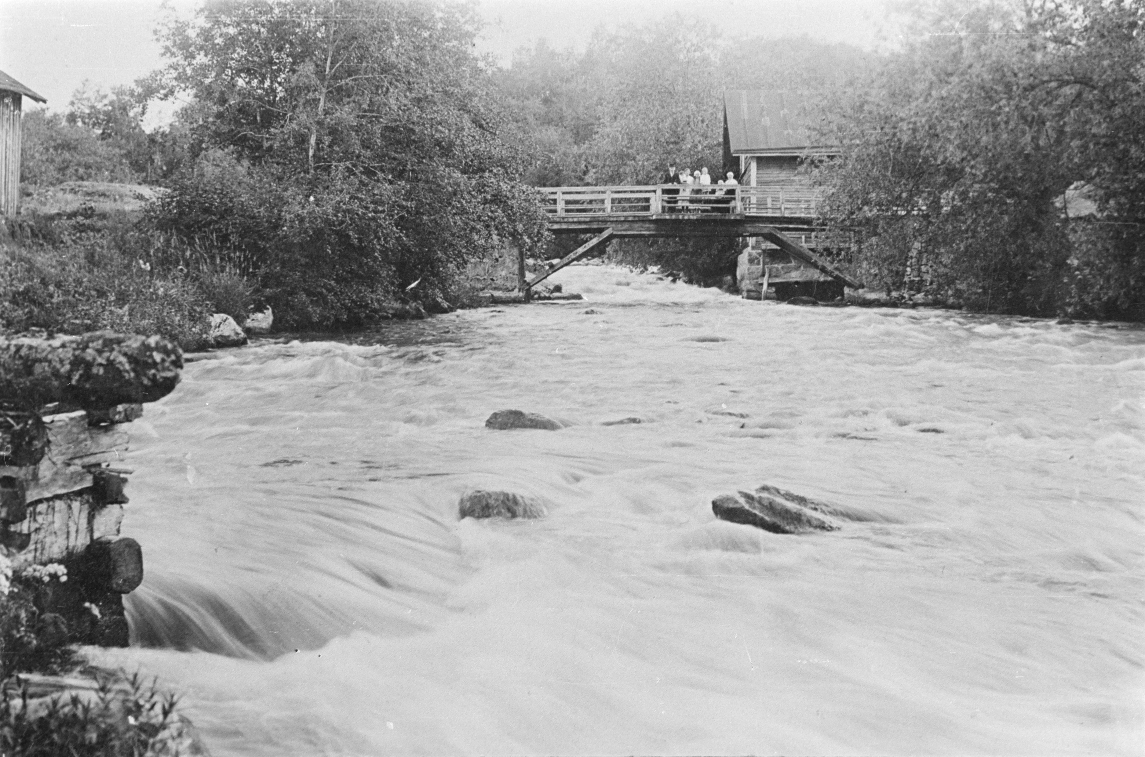 Asila, Asilankoski, 1920-30-е годы.